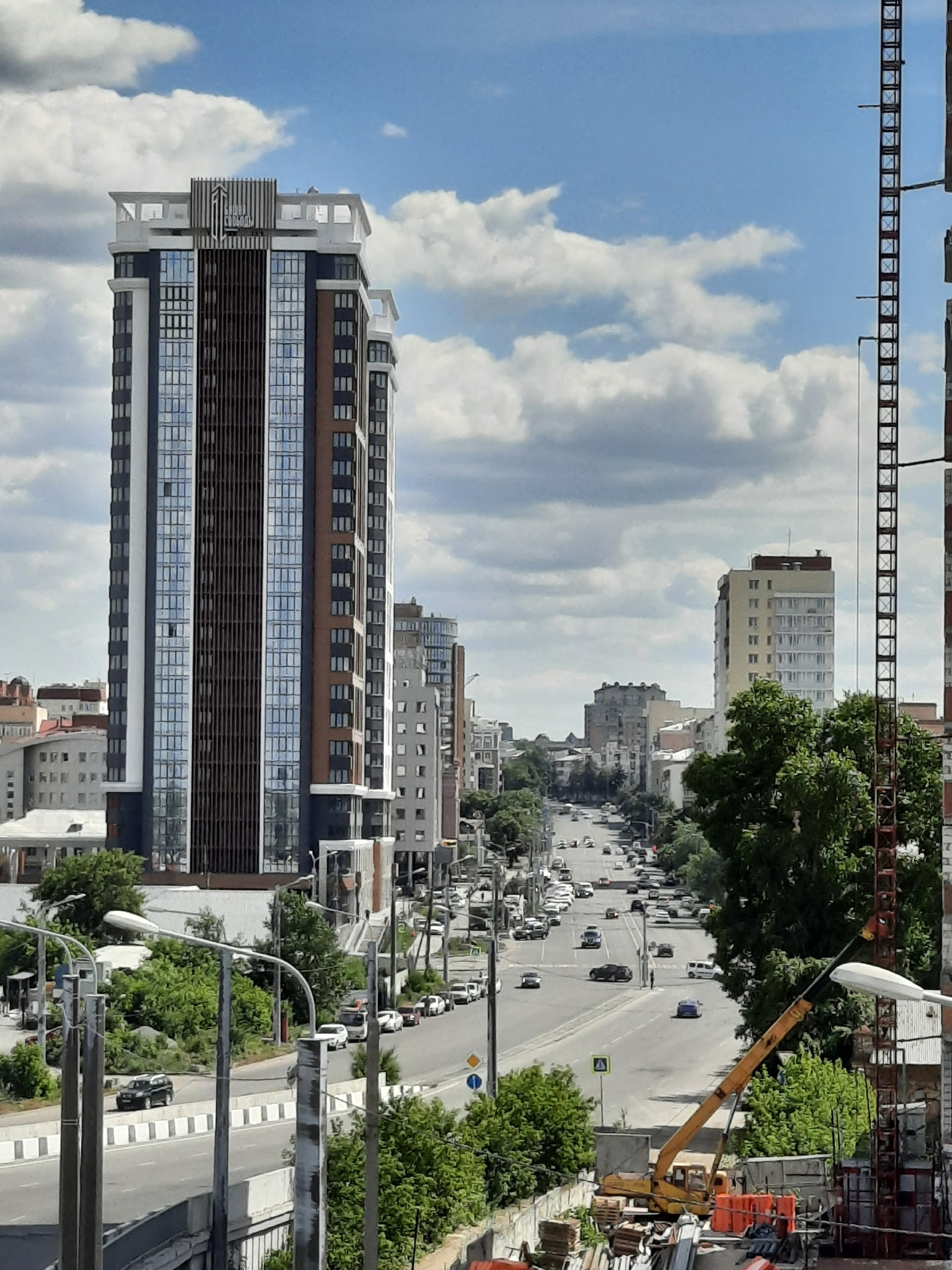 На фото показан вид на южное направление улицы Свободы в Центральном районе города Челябинск, Россия. Фото сделано со стороны реки Миасс с развязки на пересечении улиц Братьев Кашириных, Российской, Свободы и Труда.